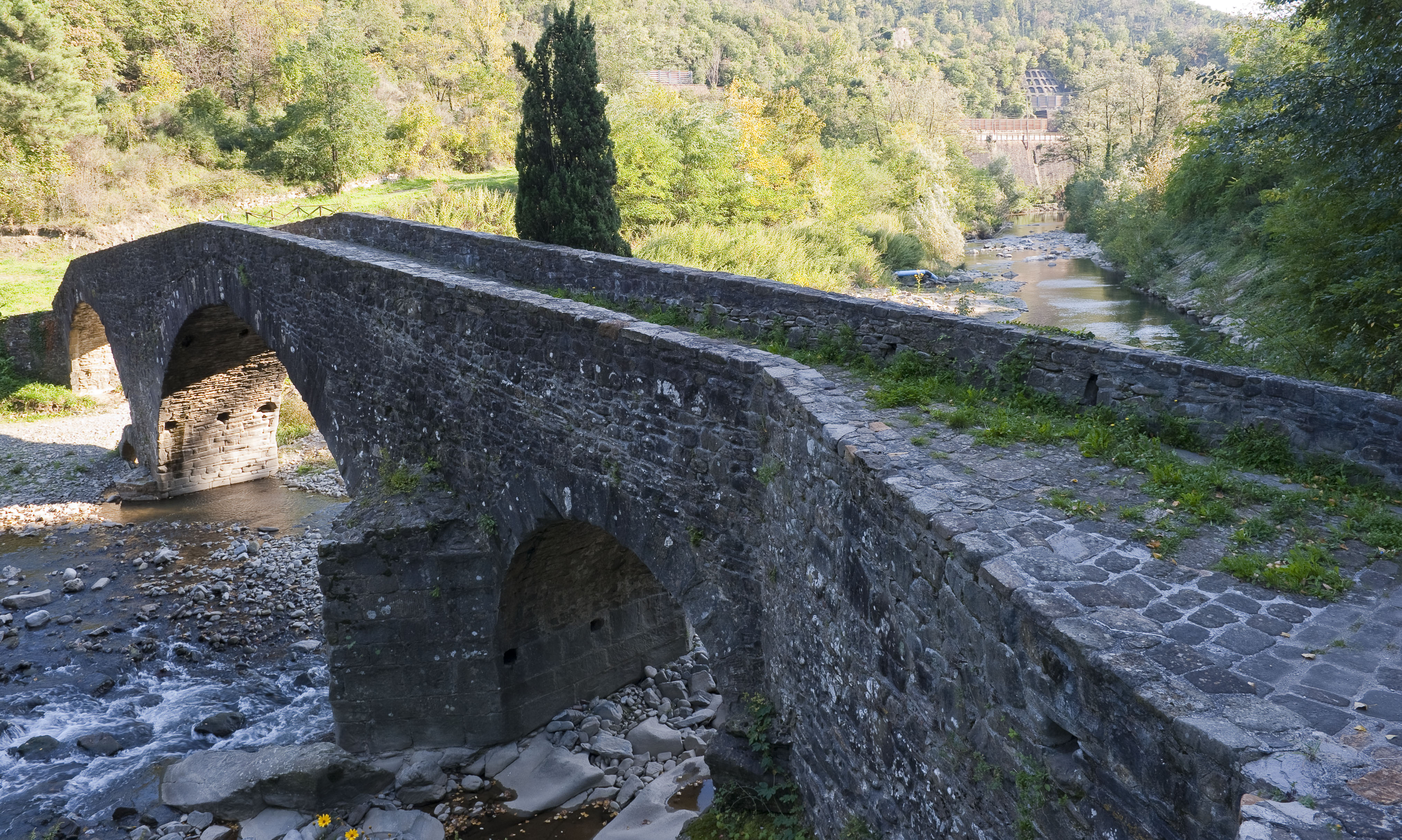 Ponte di Cerbaia Cantagallo, Prato